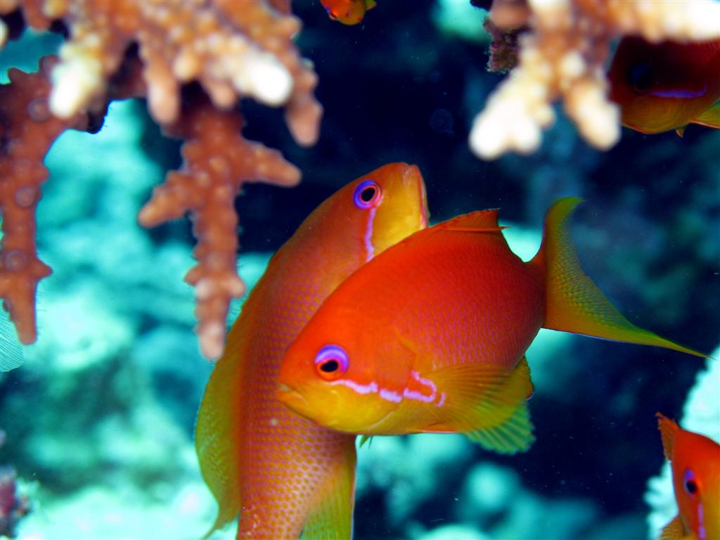 Pseudanthias squamipinnis; Egypt-Sinai-Dahab